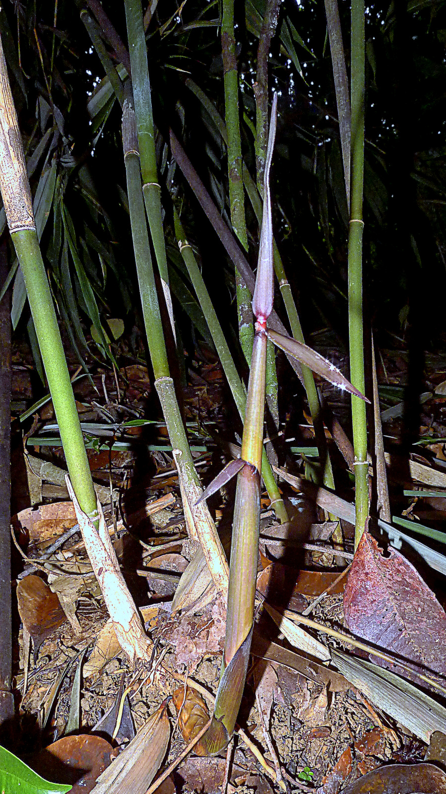 Merostachys procerrima Send.